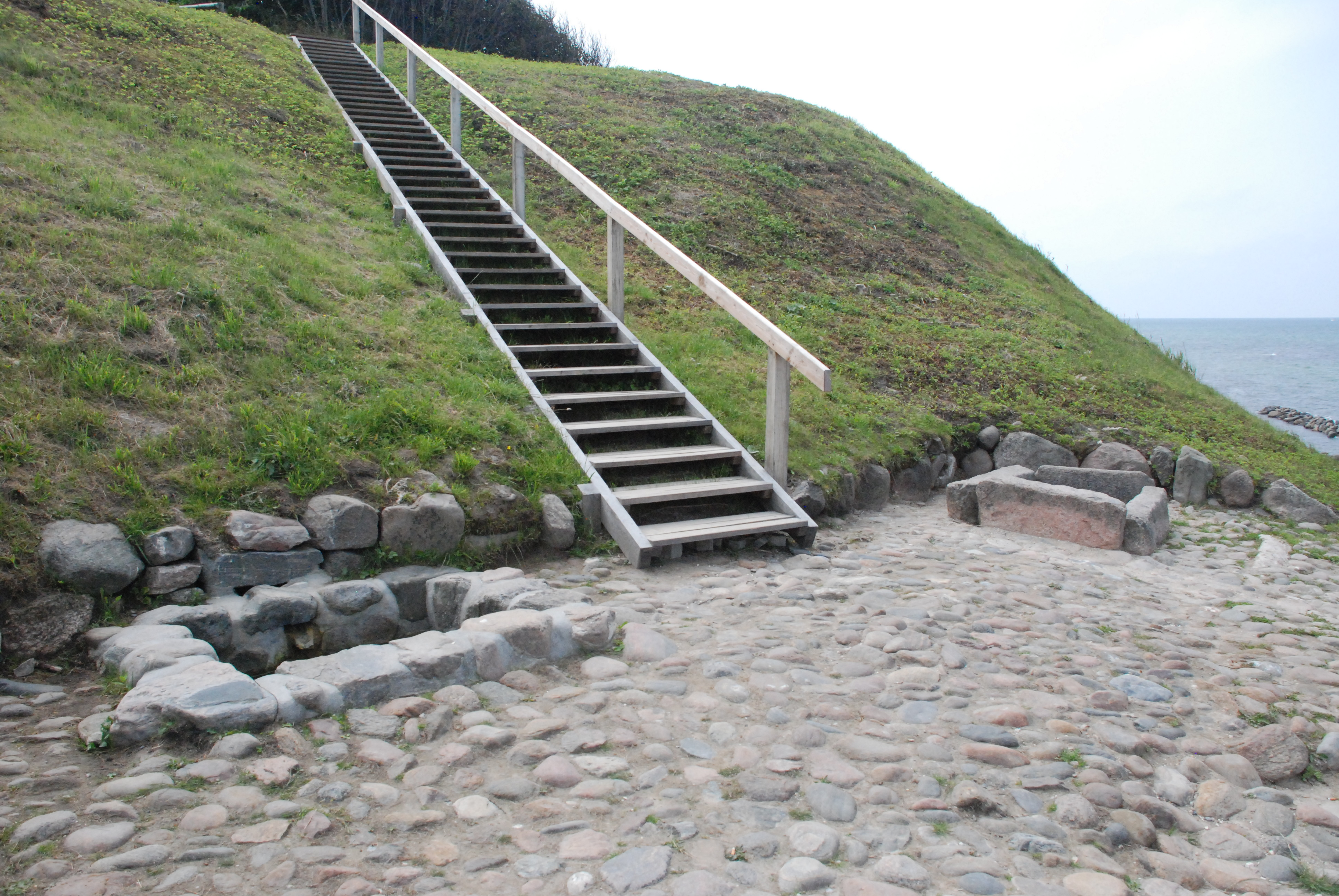 Helene Kilde, Tibirke Sogn, Holbo Herred, Frederiksborg Amt, Danmark.